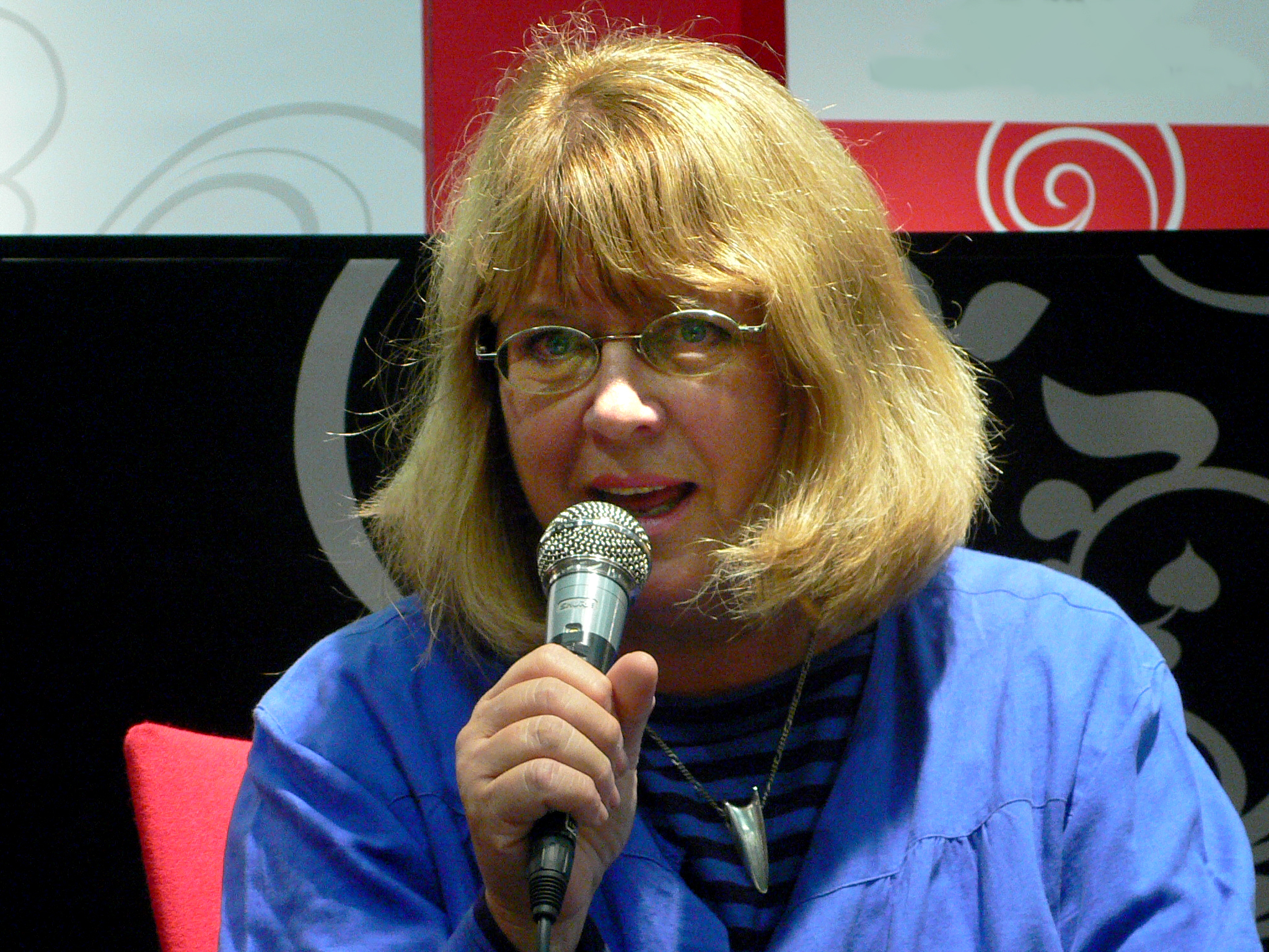 Katarina Mazetti at Gothenburg Book Fair 2007, Katarina Mazetti på Bok- och biblioteksmässan 2007